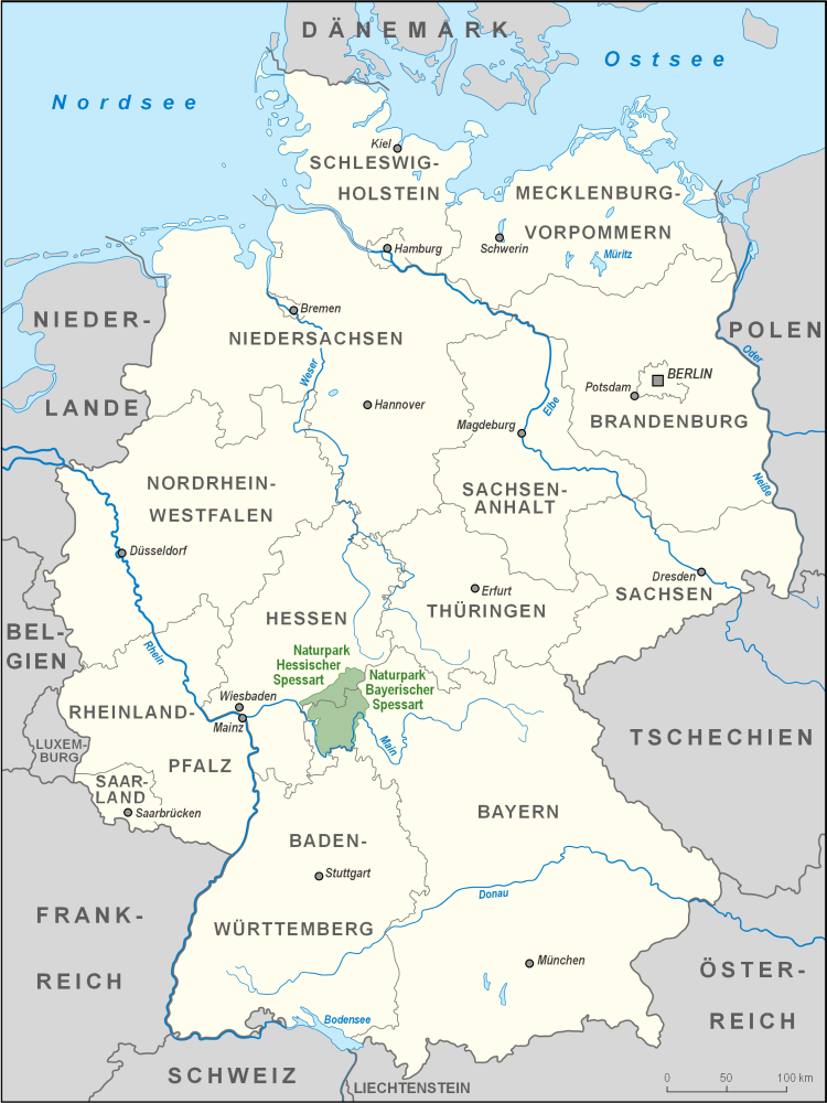 Gesamtkarte der Naturparke Bayerischer und Hessischer Spessart in Deutschland